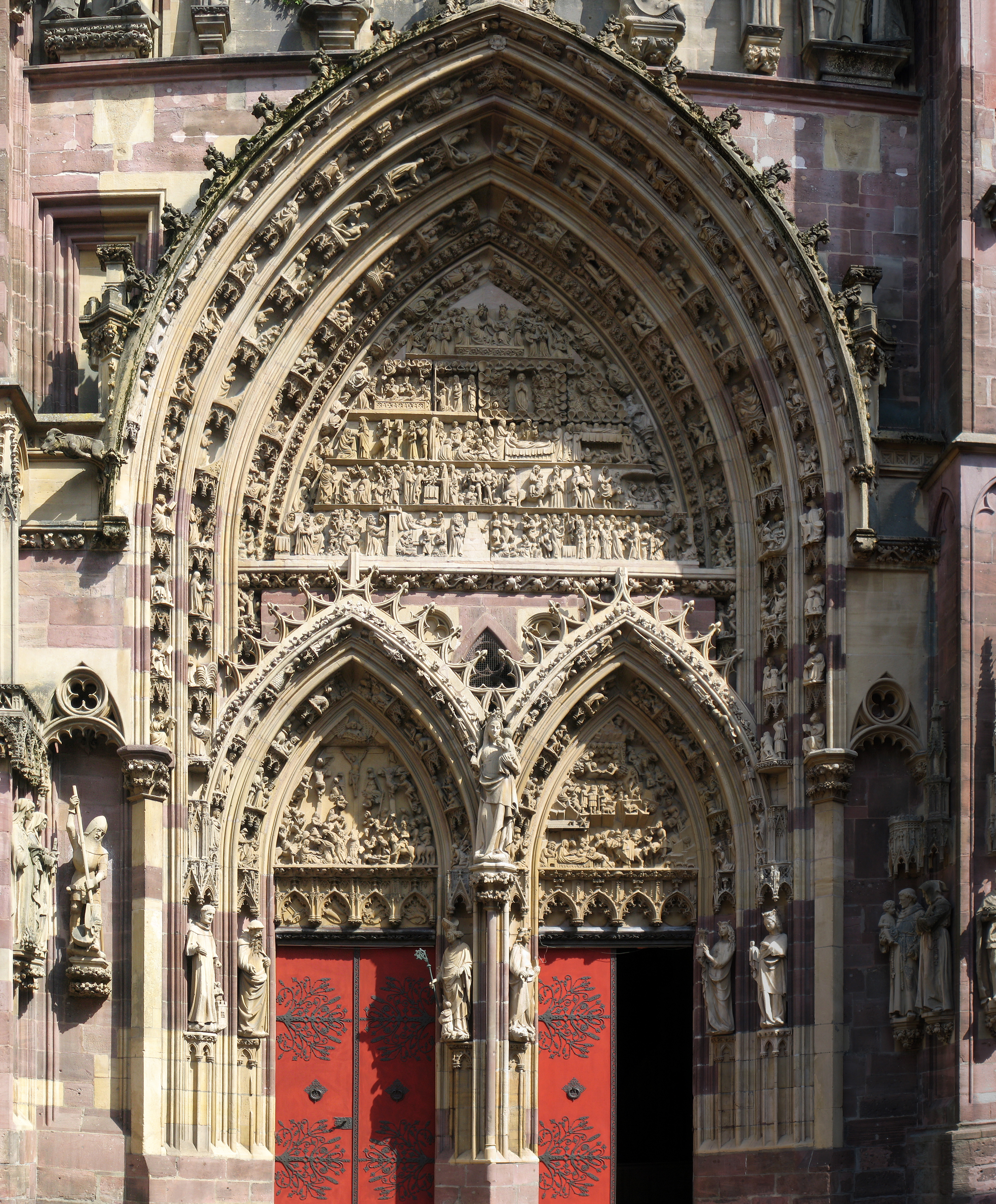 Westportal des Münsters zu Thann